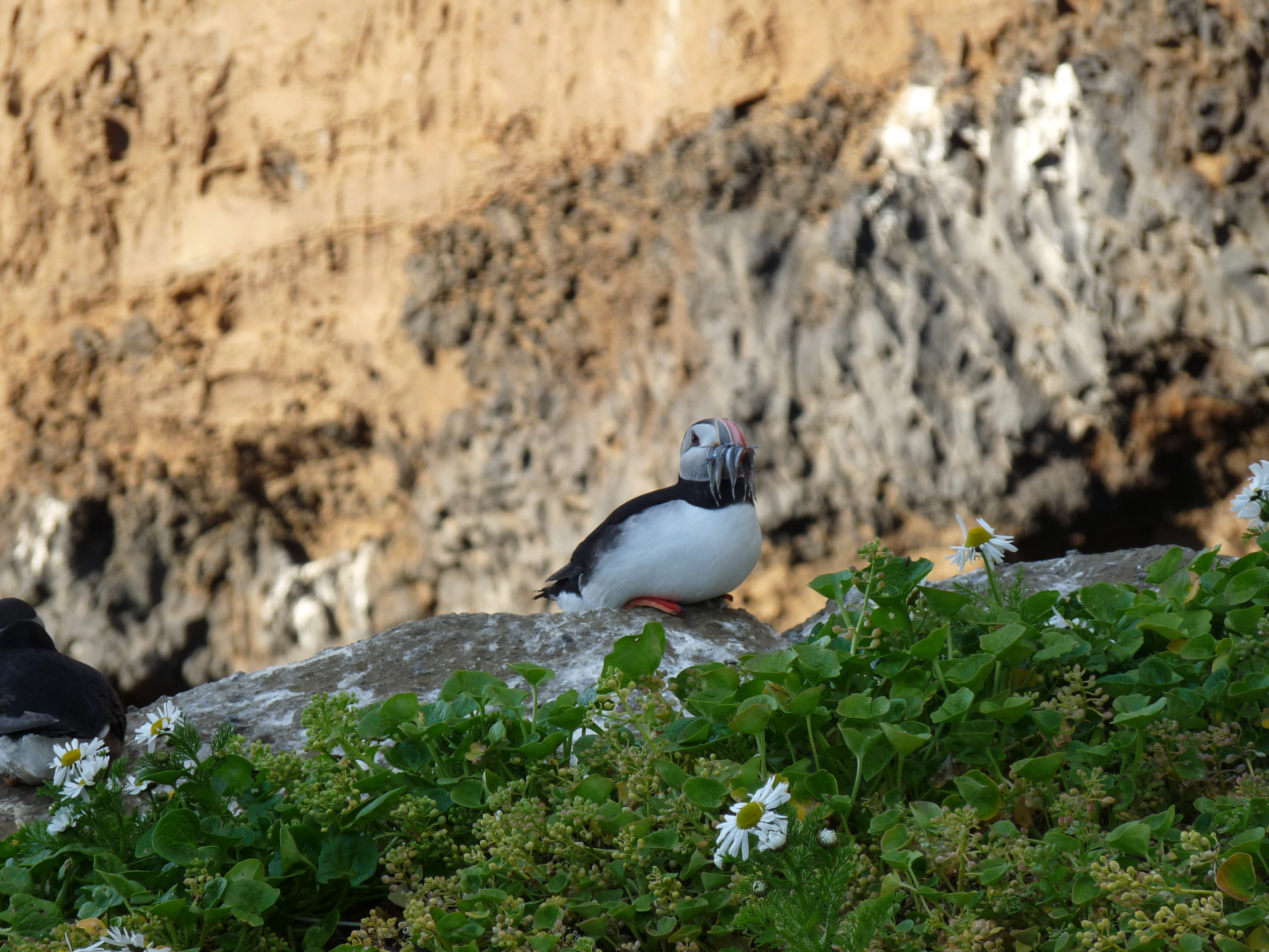 Drangey